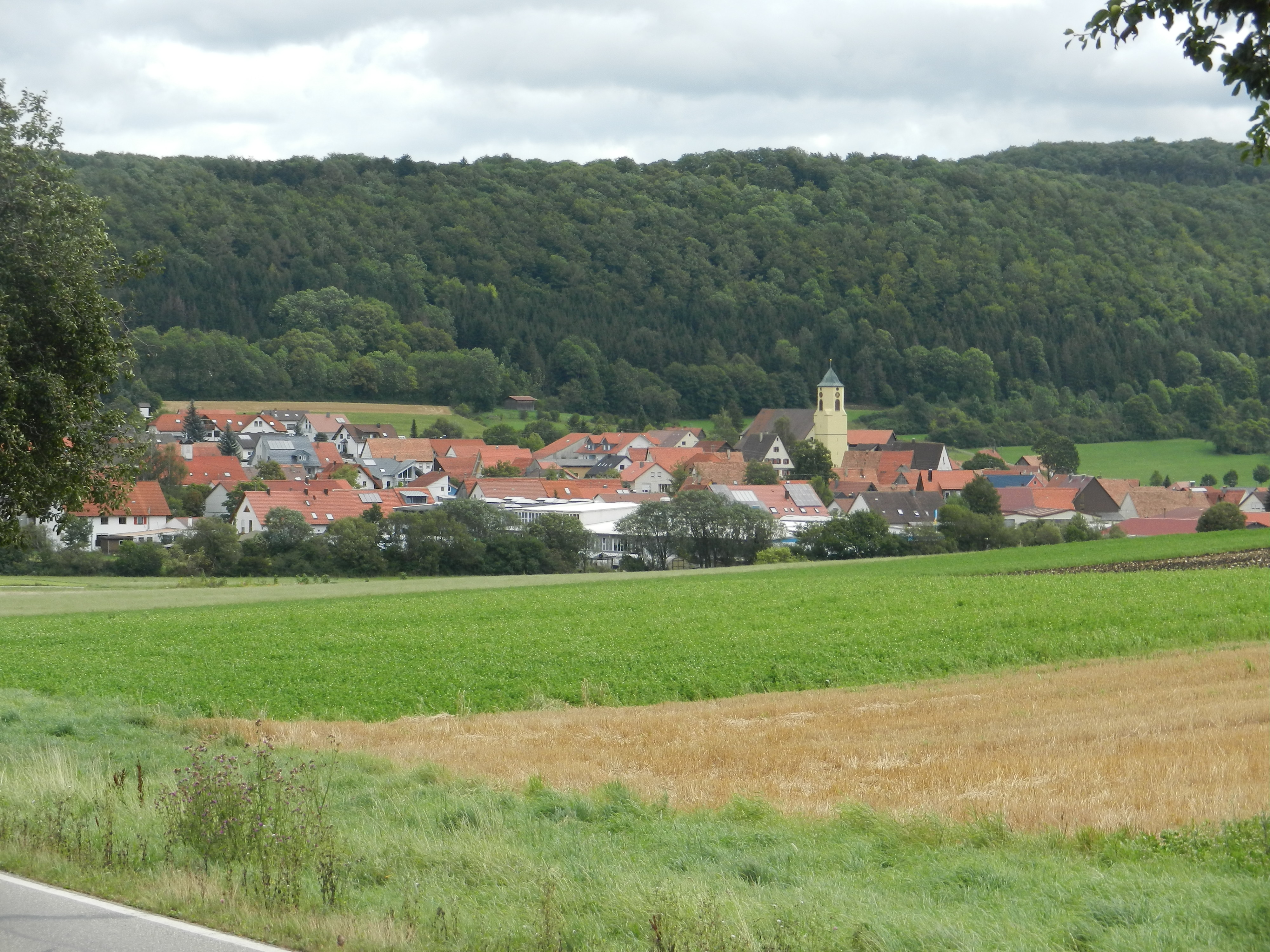 Melchingen